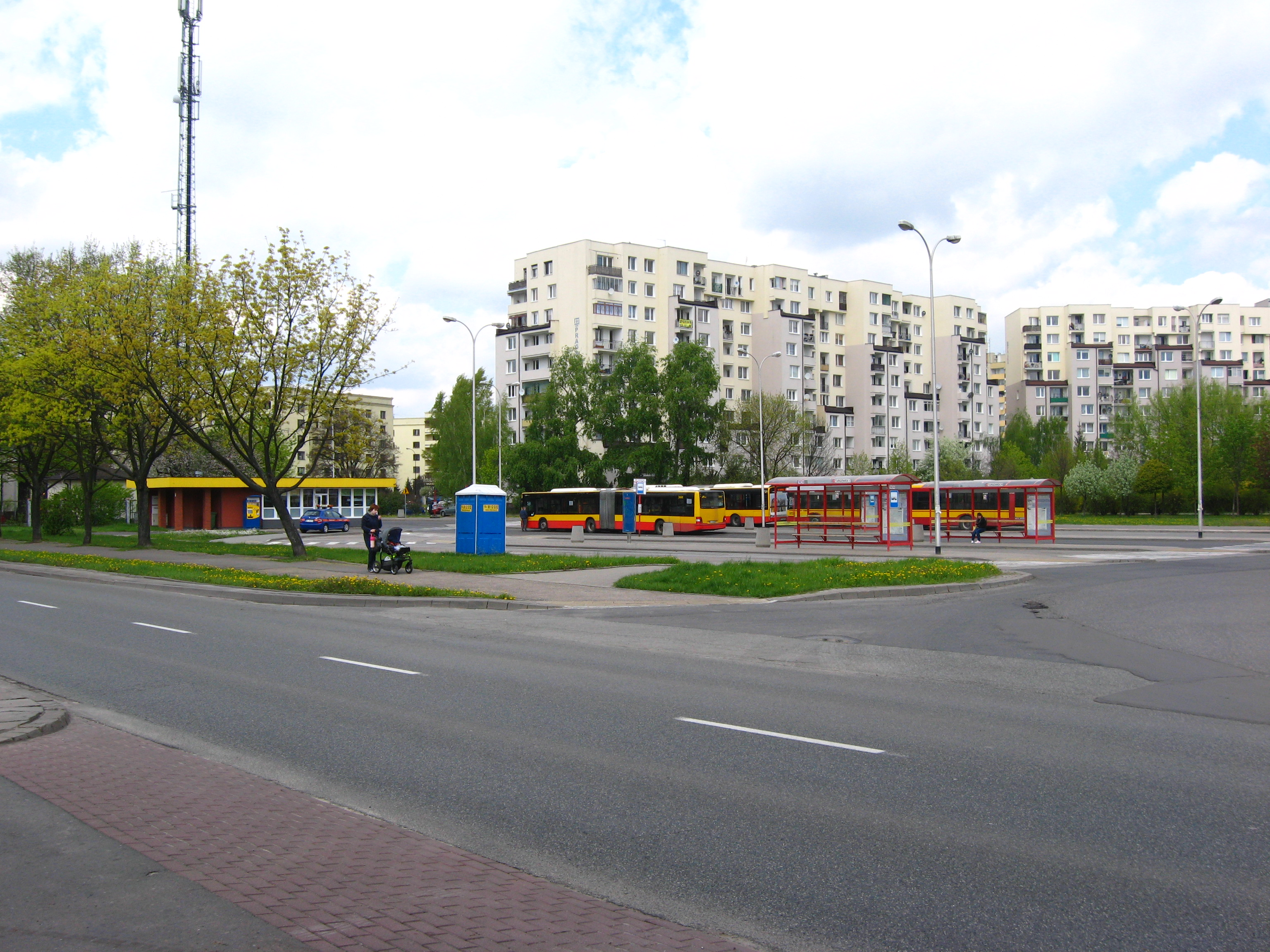 Ulica Trocka warszawskim Targówku. Widok na pętlę autobusową i bloki przy ul. Askenazego.